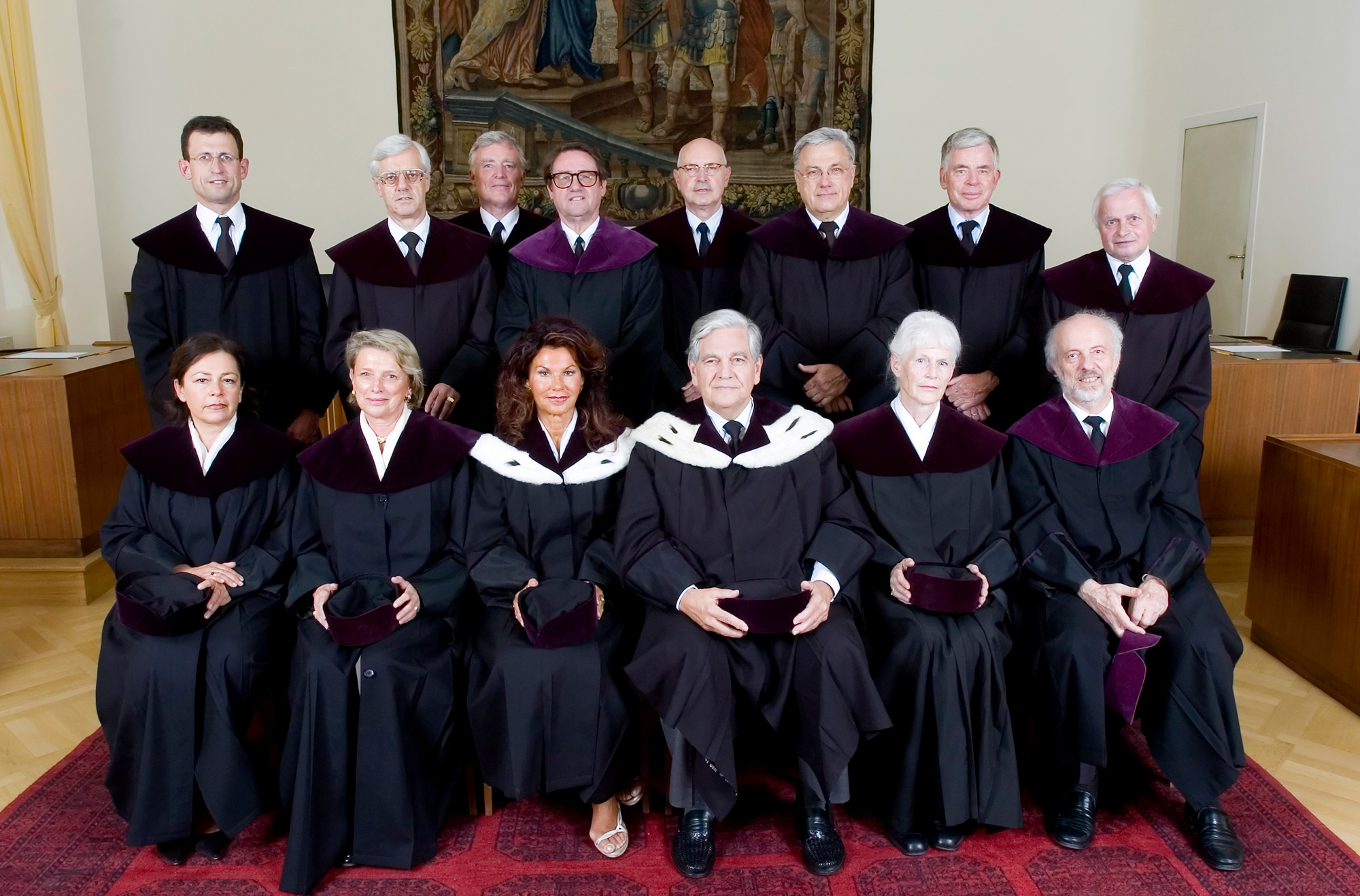 Gruppenfoto der Zusammensetzung des österreichischen Verfassungsgerichtshofs im Juni 2007.Vorne (v.l.n.r.): Claudia Kahr, Eleonore Berchtold-Ostermann, Vizepräsidentin Brigitte Bierlein, Präsident Karl Korinek, Lisbeth Lass, Kurt HellerHinten (v.l.n.r.): Christoph Grabenwarter, Gerhart Holzinger, Herbert Haller, Karl Spielbüchler, Peter Oberndorfer, Rudolf Müller, Hans Georg Ruppe, Willibald Liehr